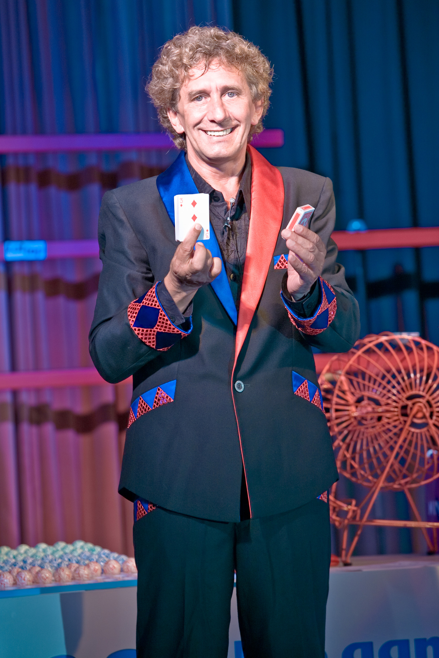 Tony Rei